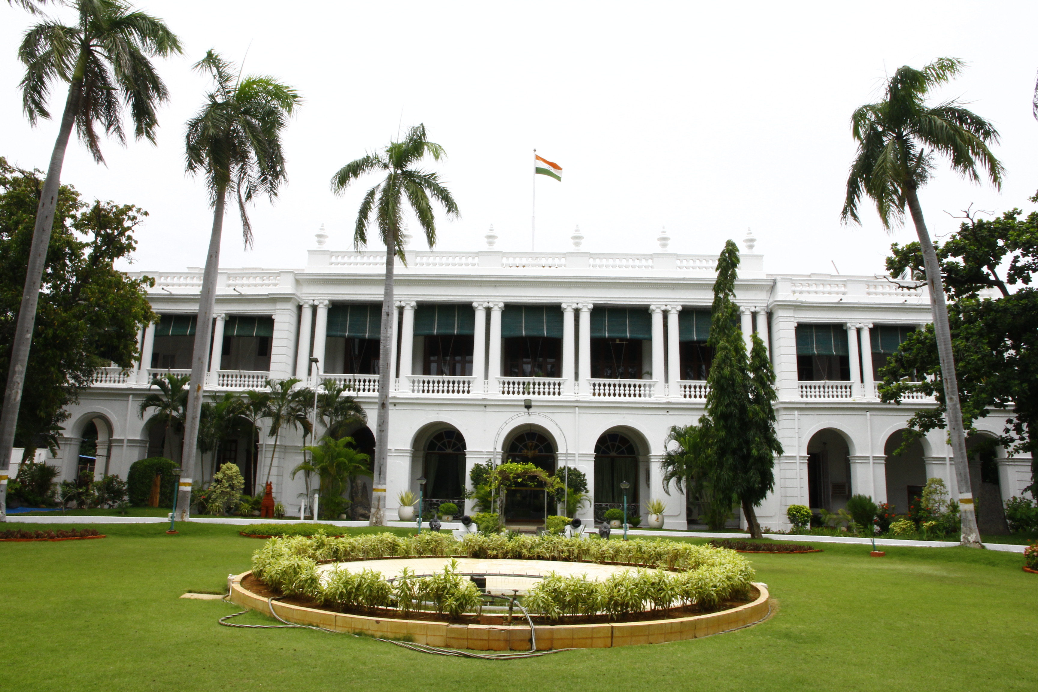 C'est la vue de face de la residence officielle du Lieutenant-Gouverneur de Puducherry